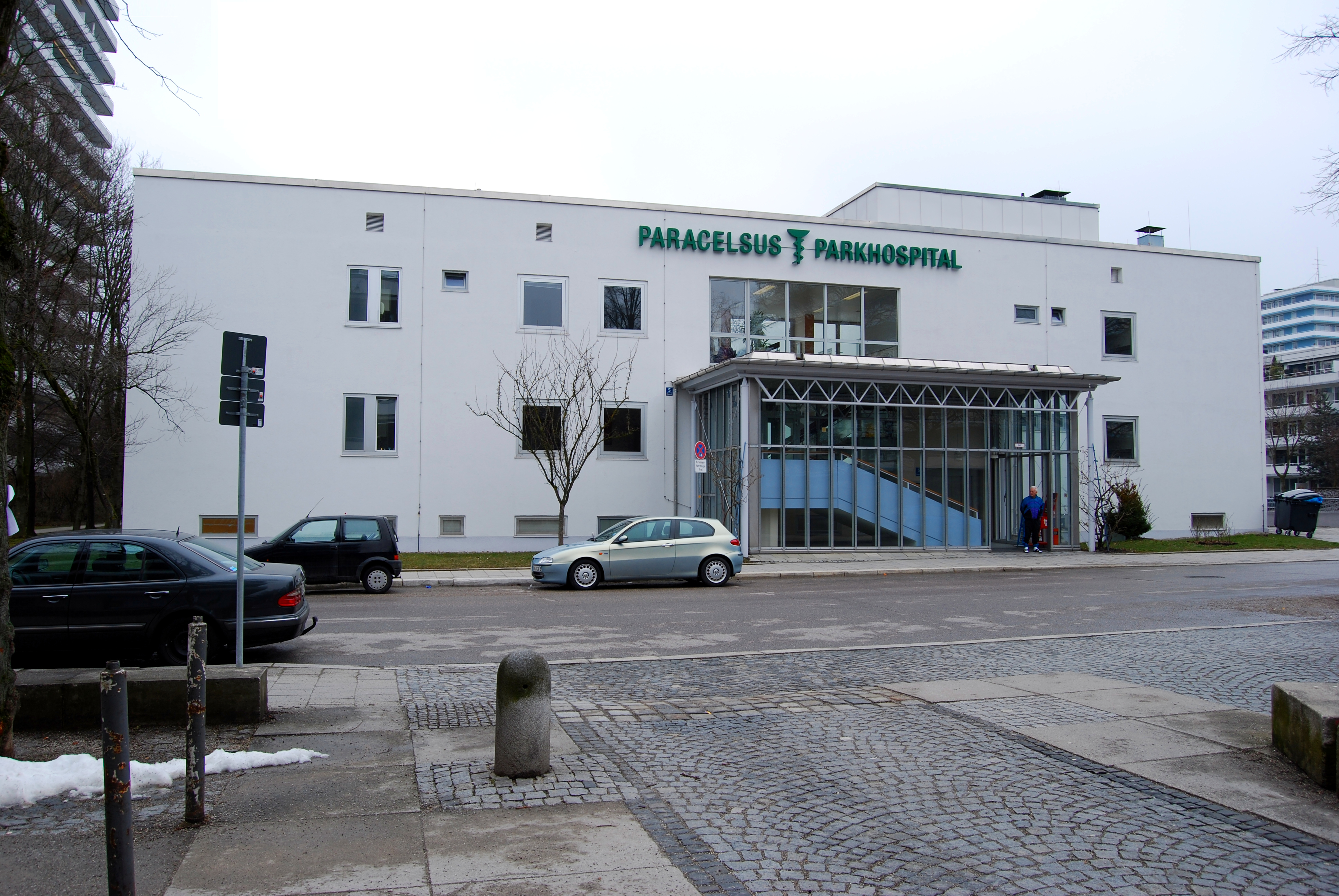 Paracelsus-Klinik München-Englschalking, Südfassade